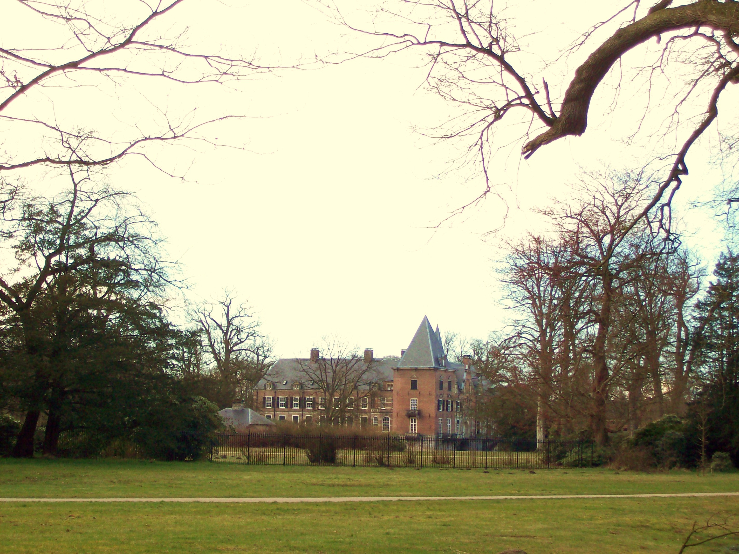 Twickel vanuit het zuidoosten